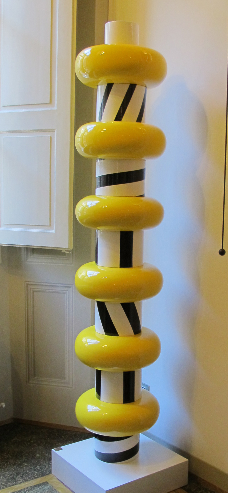 Ettore sottsass, odalisca